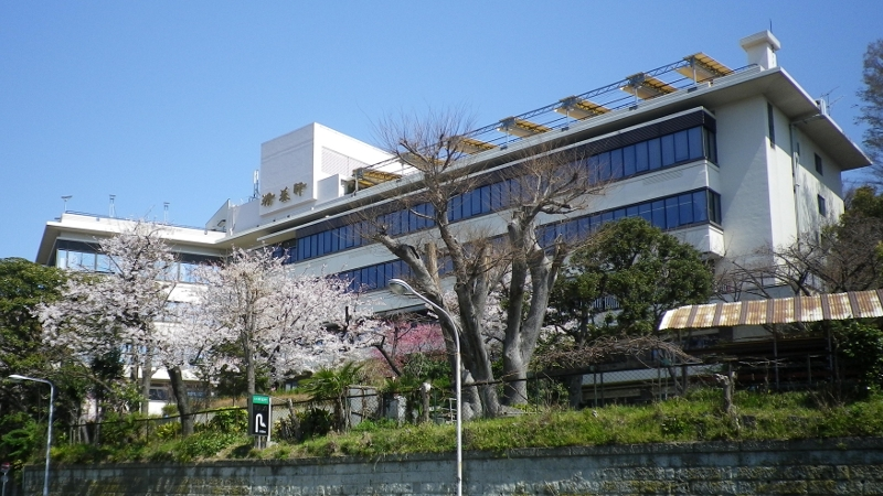 上野精養軒